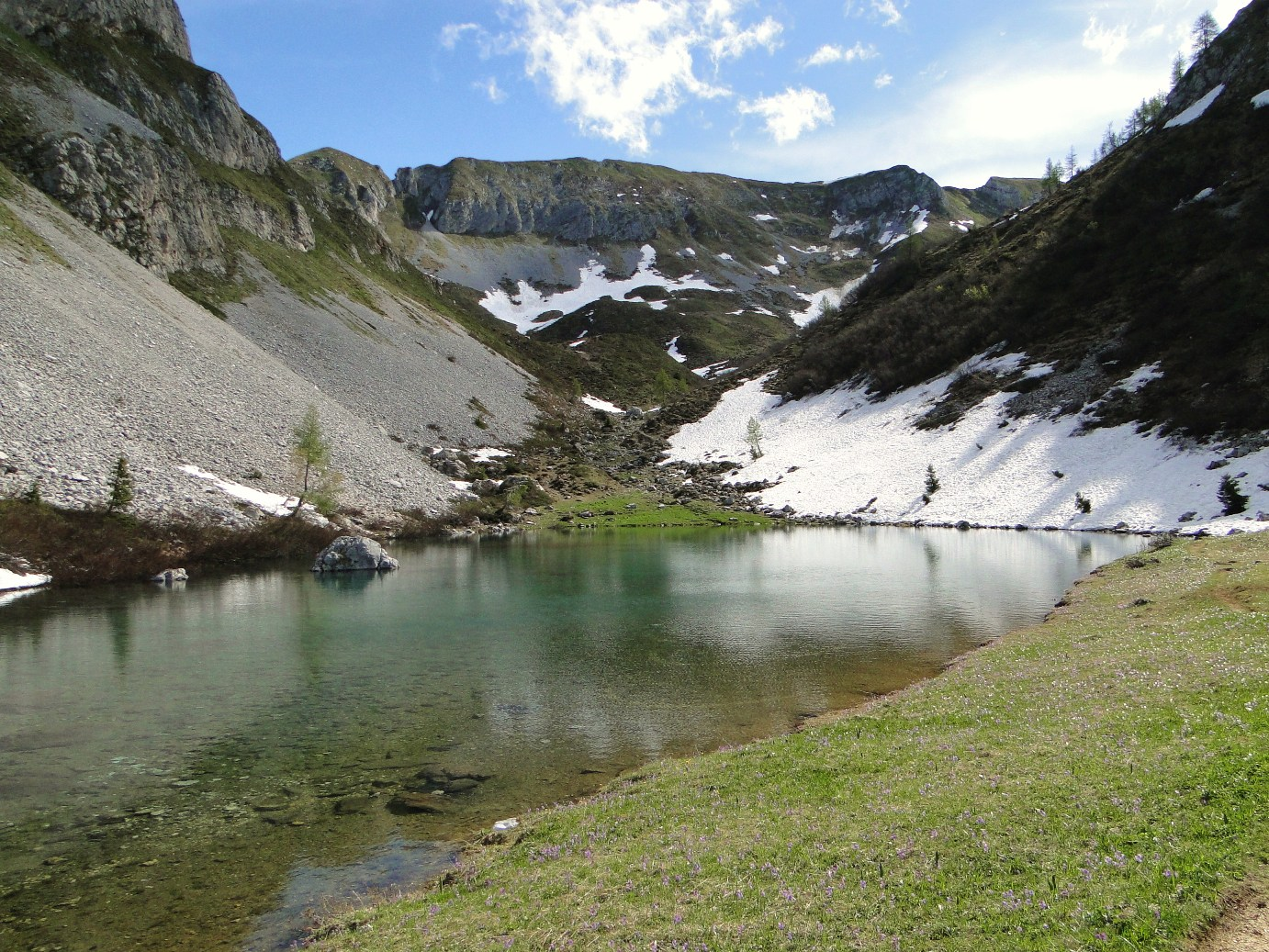 Lago Spigorel (o Lago di Vigna Vaga), val Sedornia, Valbondione (BG)